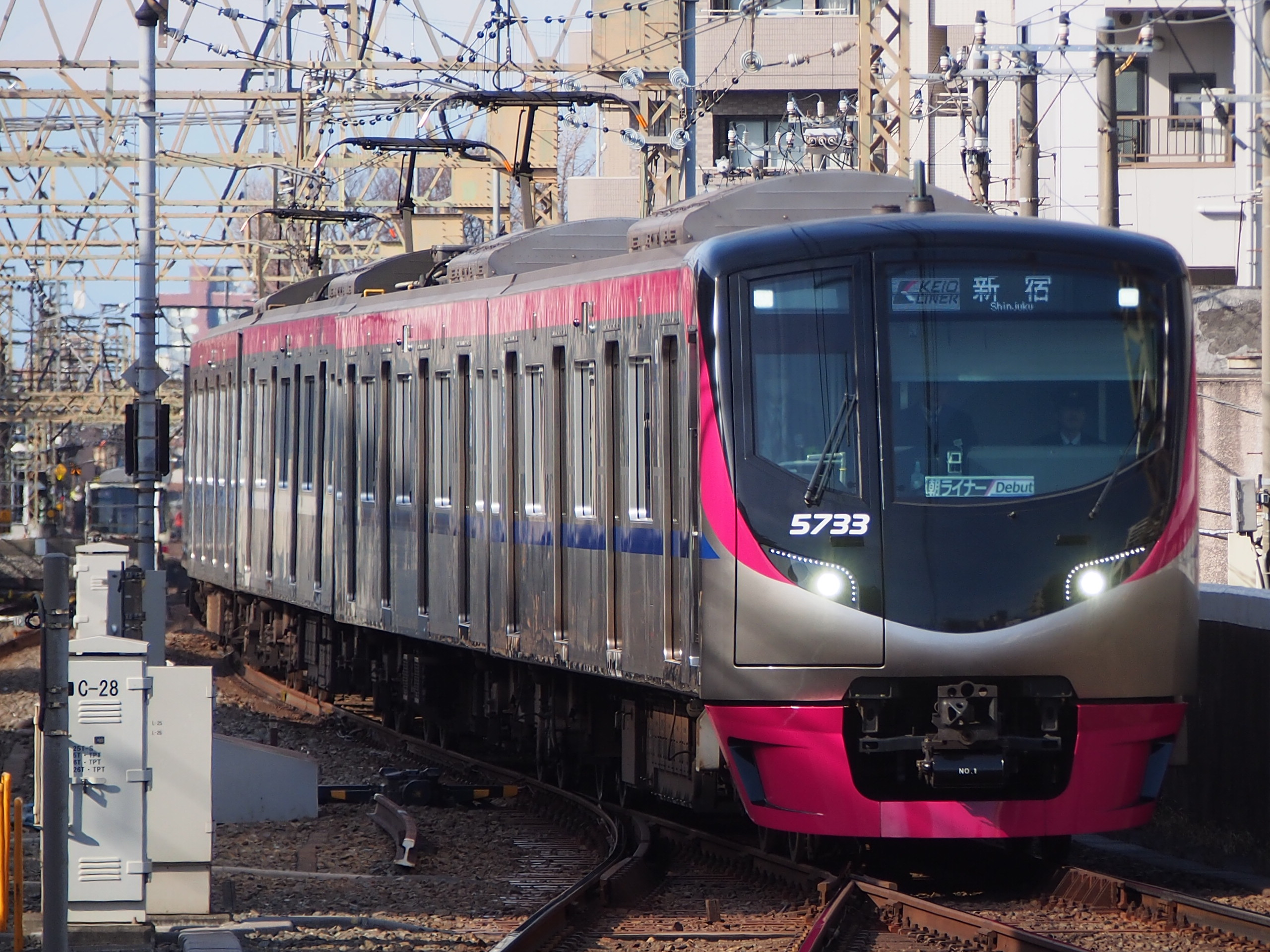 京王ライナー新宿行き。笹塚駅にて。 Olympus E-PL5